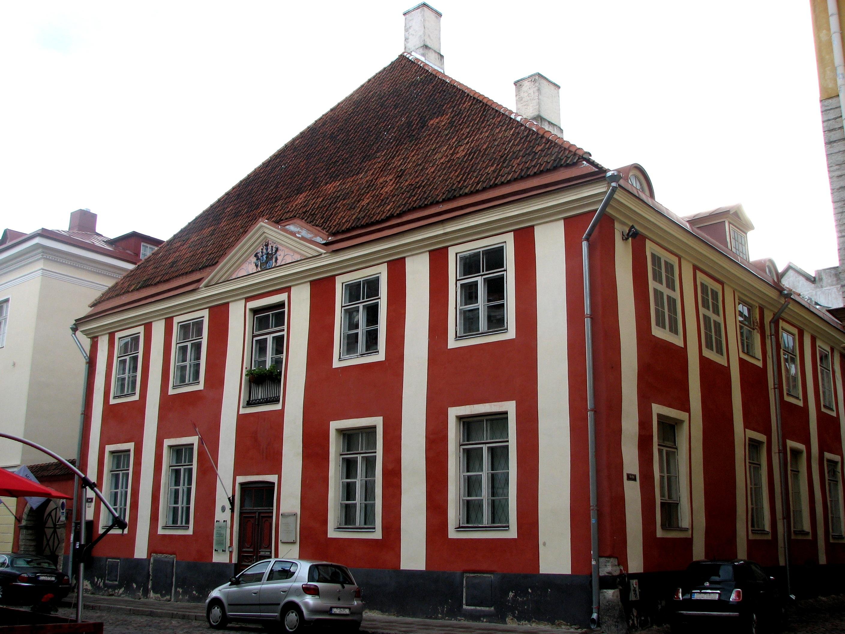 Elamu Lai tn 17, 1680. a., 1887.a.